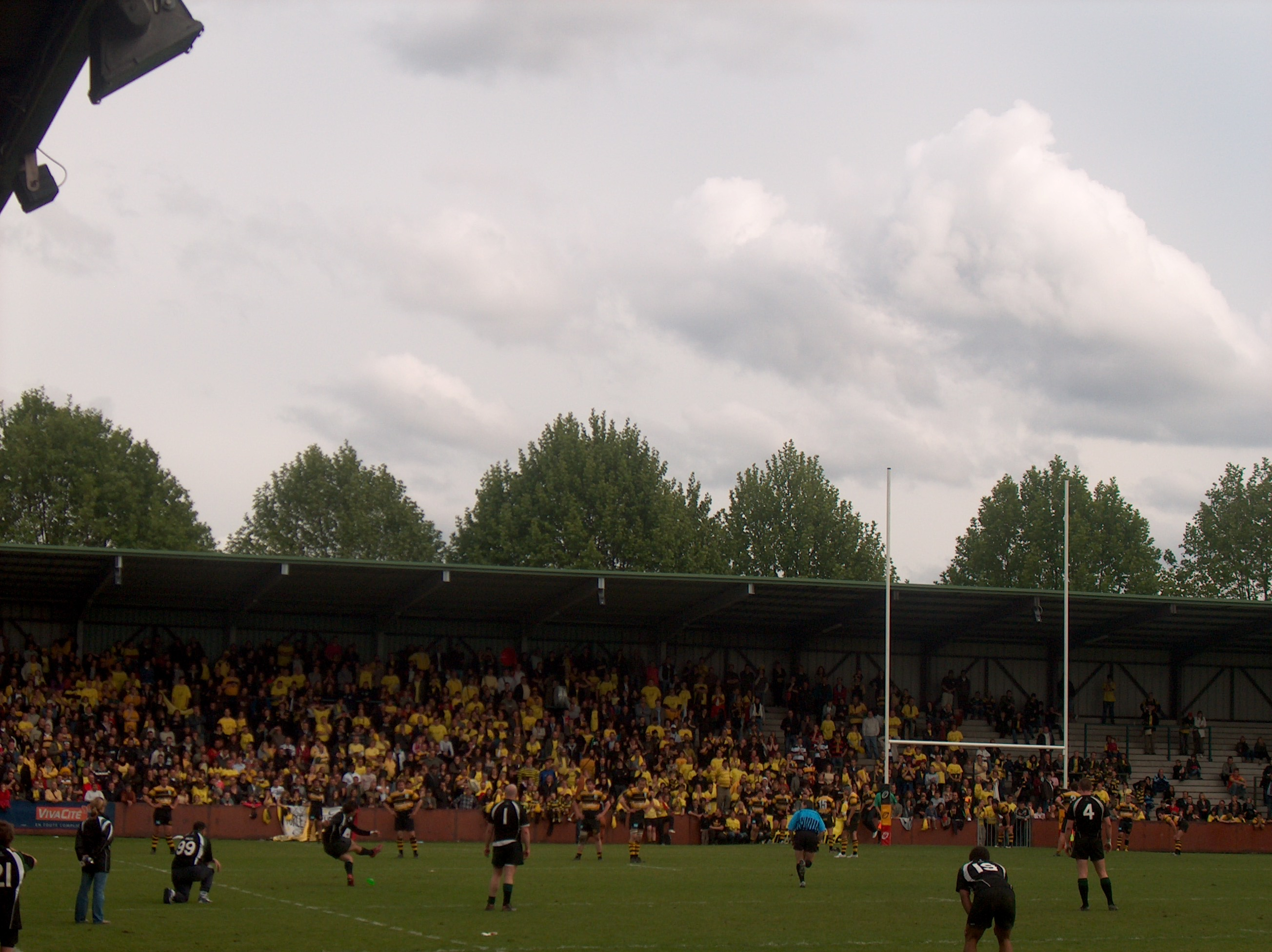 Tir victorieux de Romain Orban (Kituro Rugby Club) lors de l’ultime seconde de la finale du championnat de Belgique de rugby à XV 2008-2009.